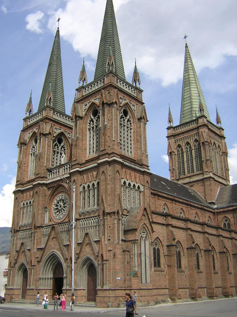 Iglesia Nuestra Señora del Perpetuo Socorro. Medellín, Colombia.